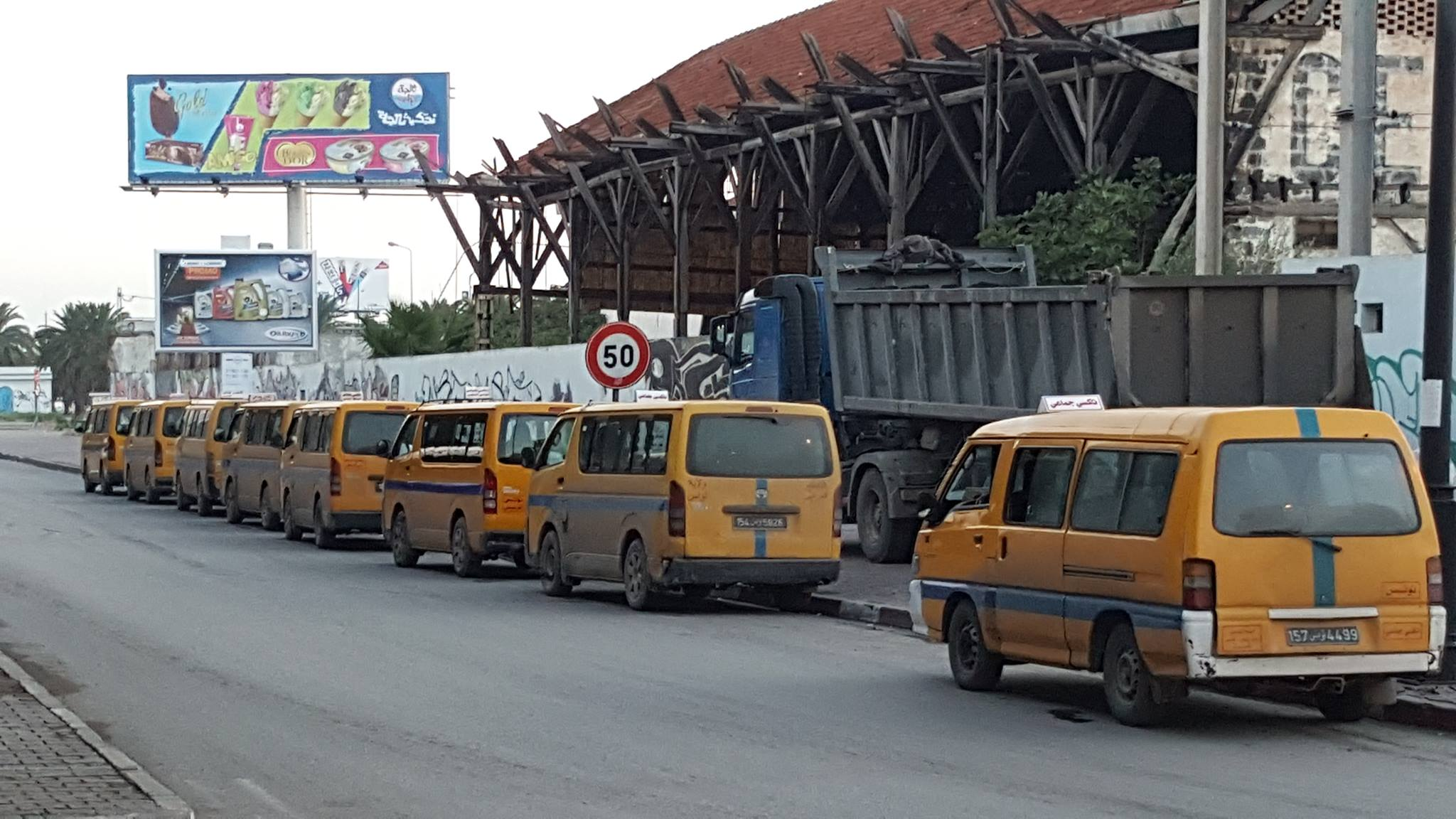 سيارات التاكسي جماعي متسلسلة